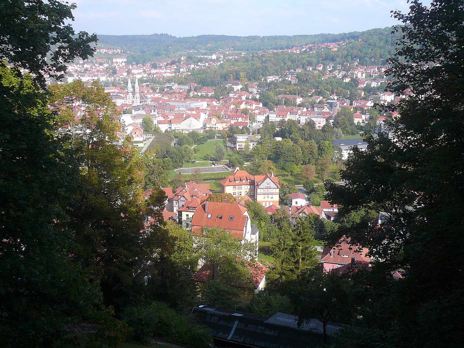 Goetz-Höhle